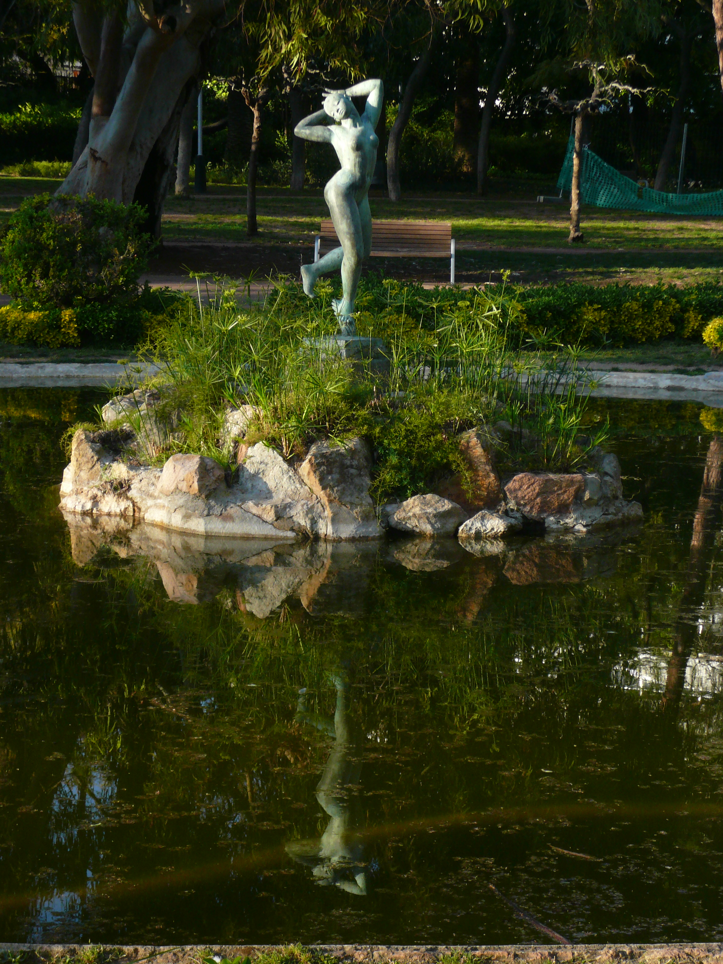 Dríade, al parc de Vil·la Amèlia, a Sarrià.